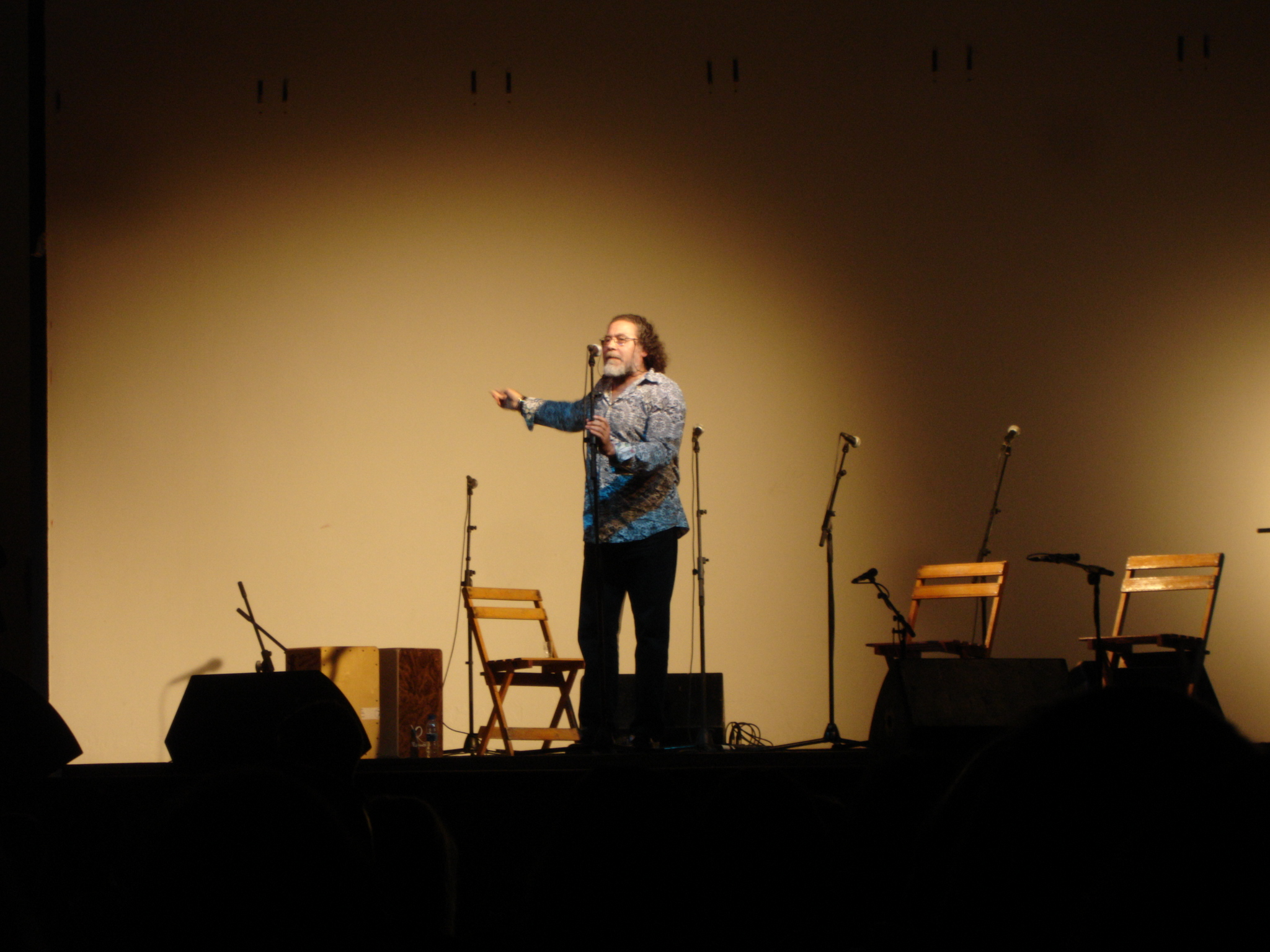 Diego Carrasco. Flamenco show in Jerez de la Frontera, Andalusia (Spain)